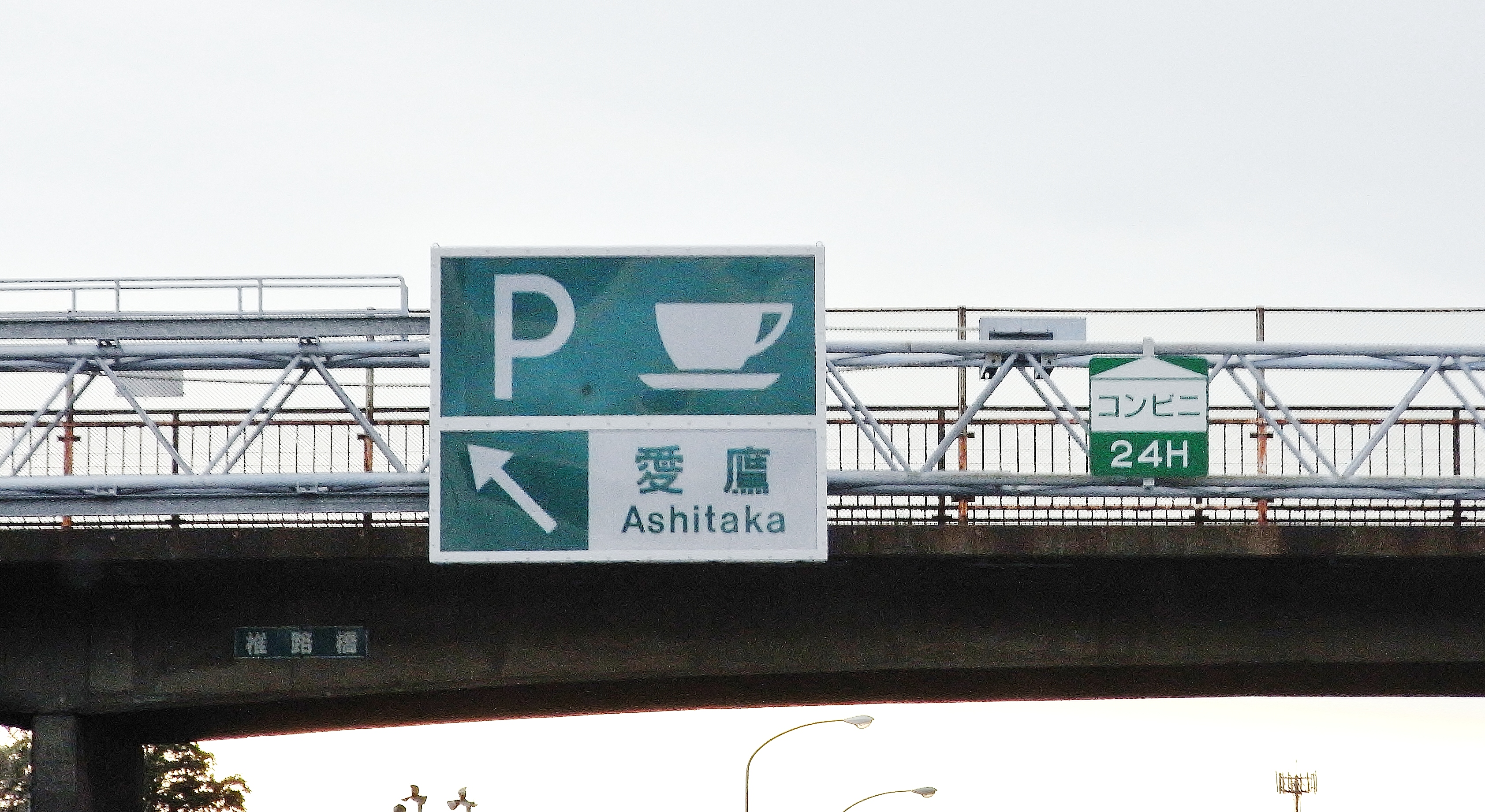 東名高速道路愛鷹PA、下り線標識